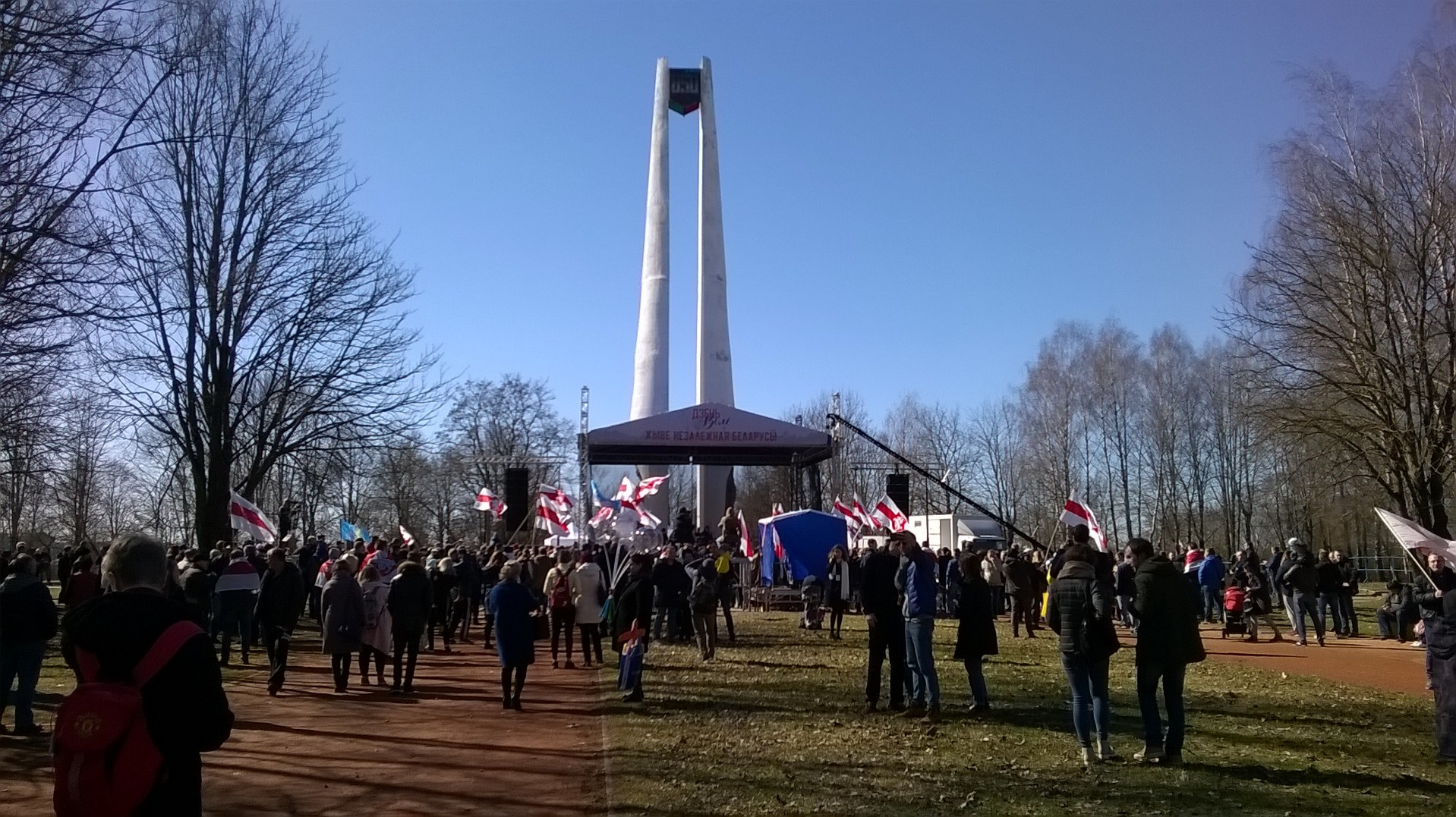 #БНР101